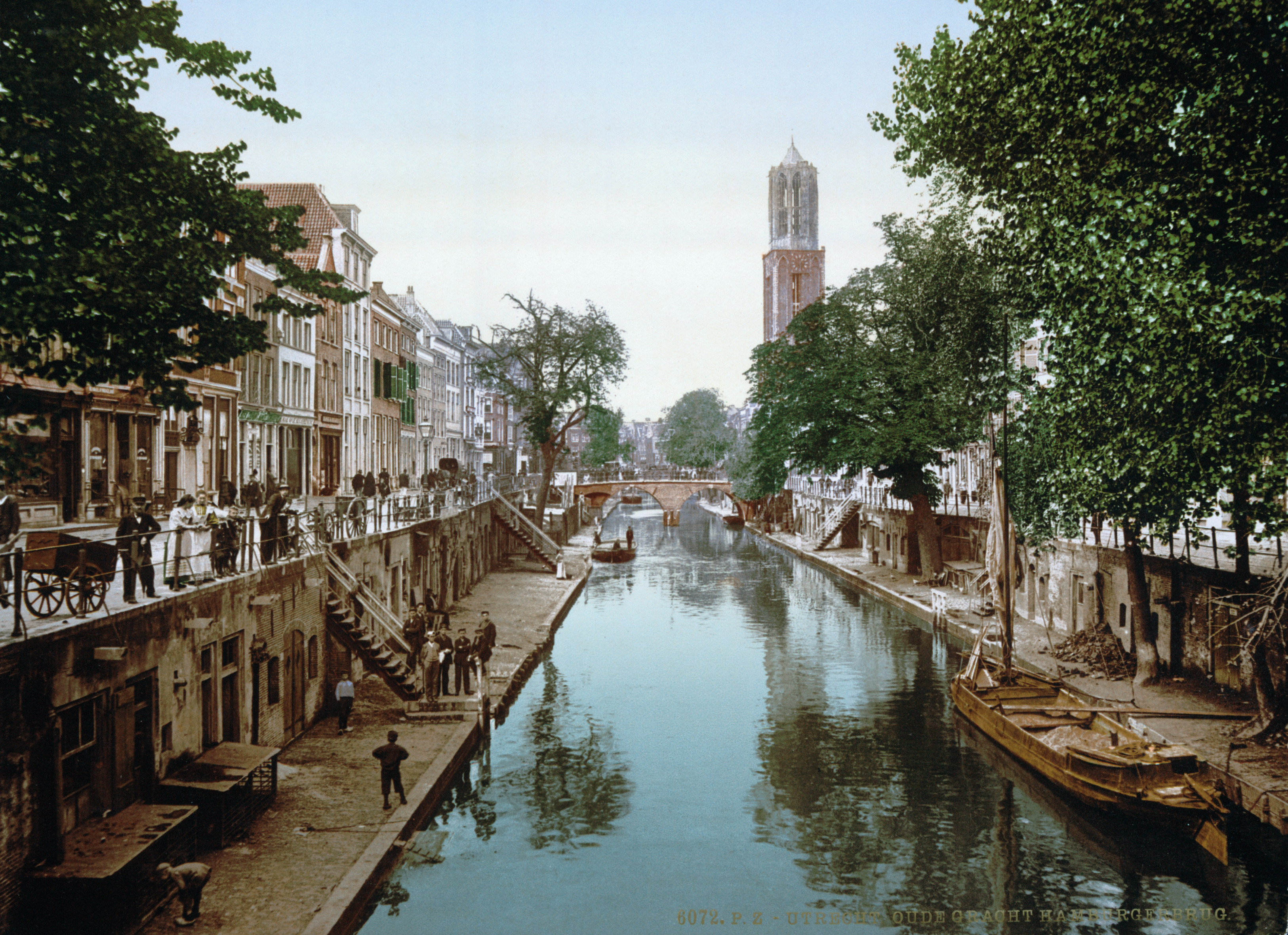 Utrecht - Oude Gracht en Hamburgerbrug